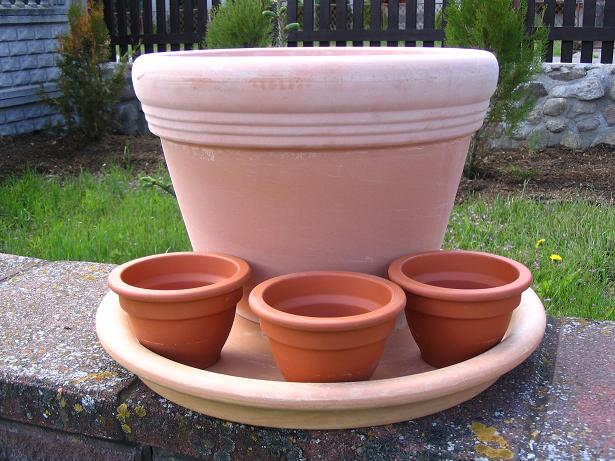 Zdjęcie doniczek